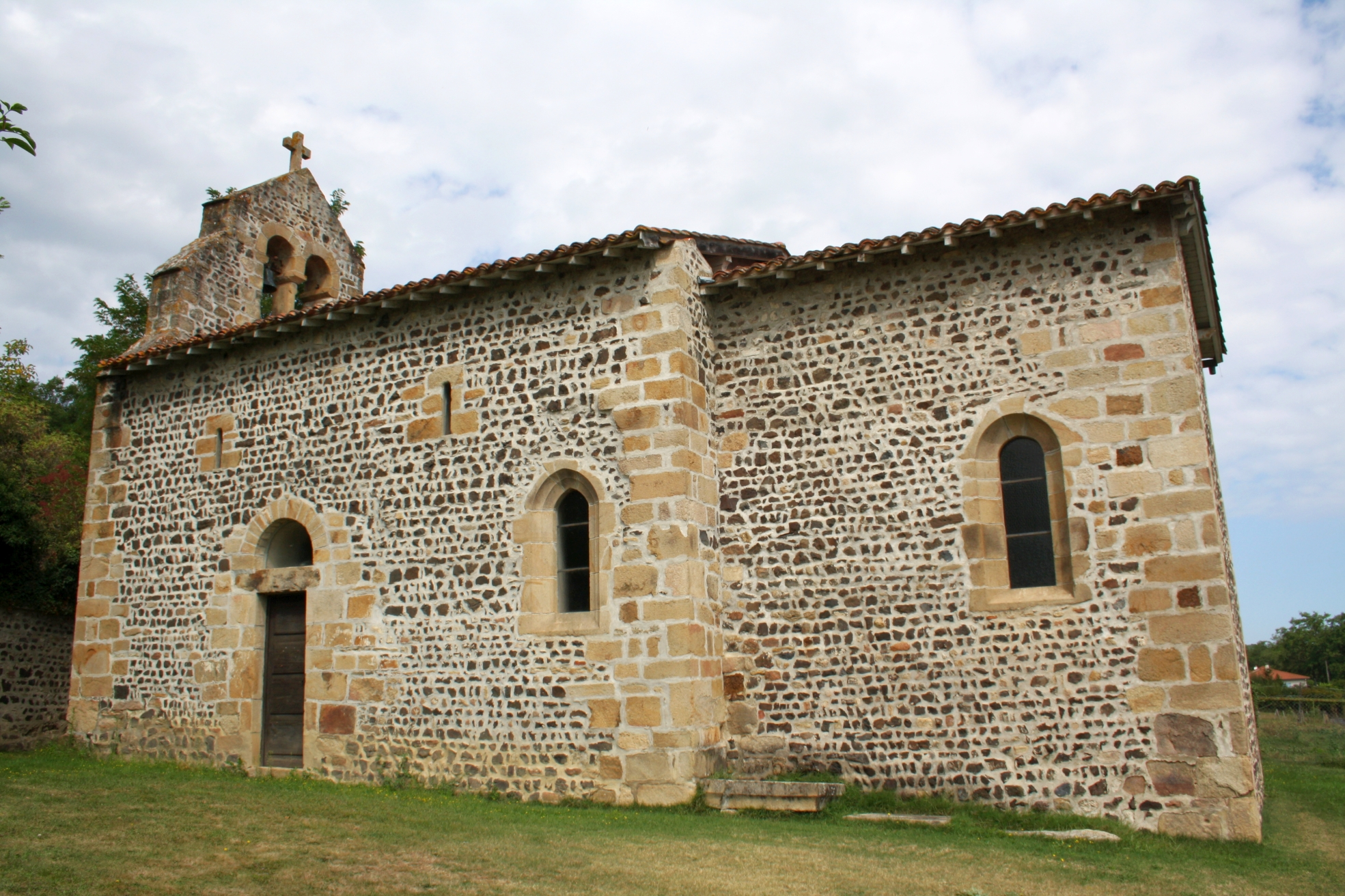 Eglise Saint-Paul à Saint-Paul-d'Uzore (Loire)